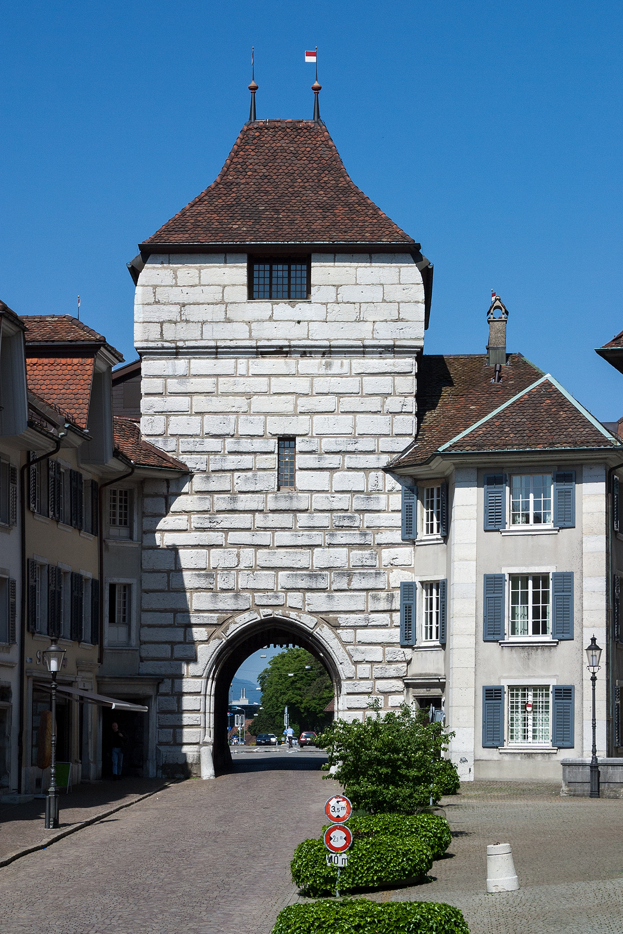 Baslertor in Solothurn